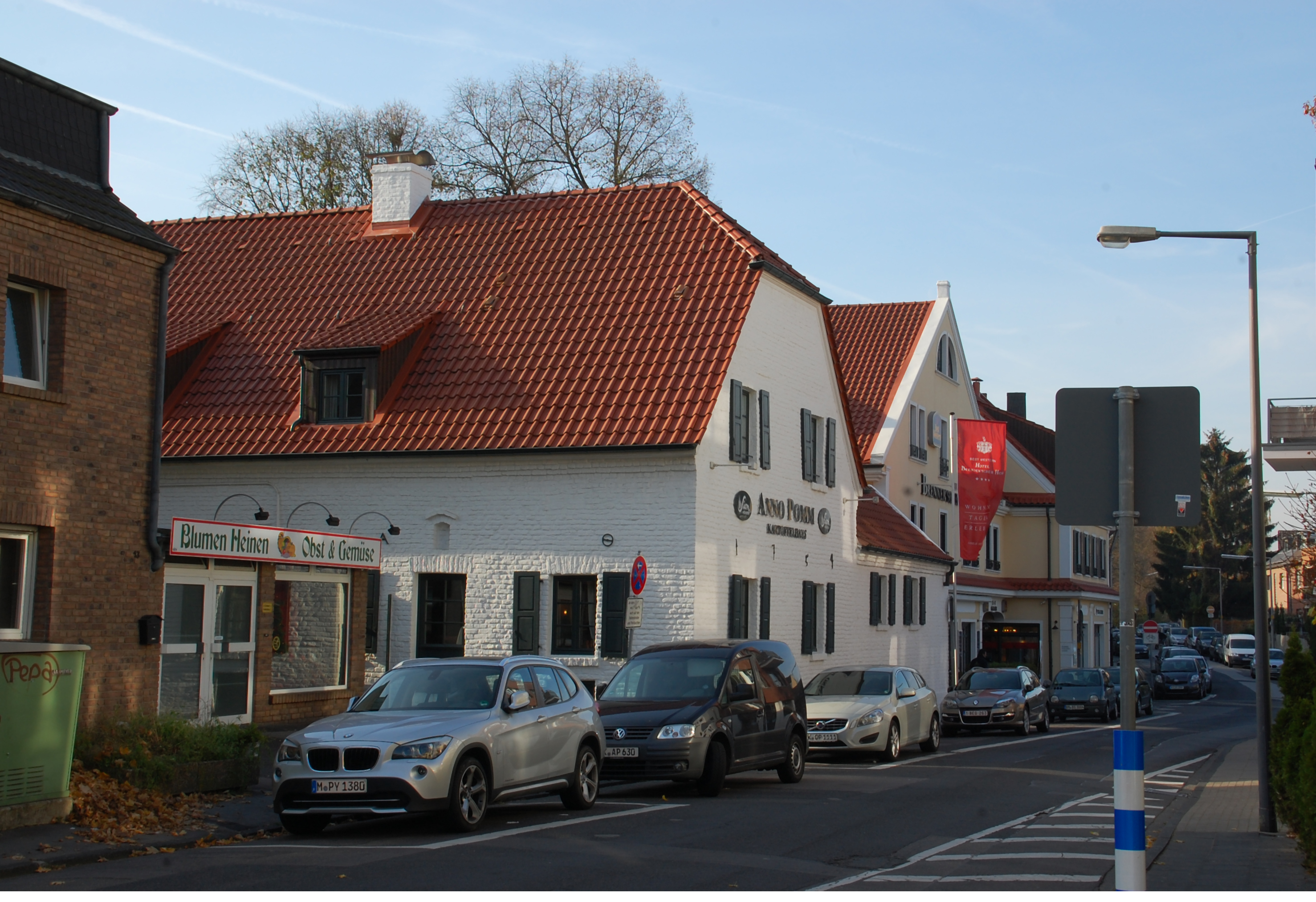 Wilhelm-von-Capitaine-Str. 15 in Köln-Junkersdorf This is the photograph of an architectural monument. It is part of the list of cultural monuments of Köln, no. 5278